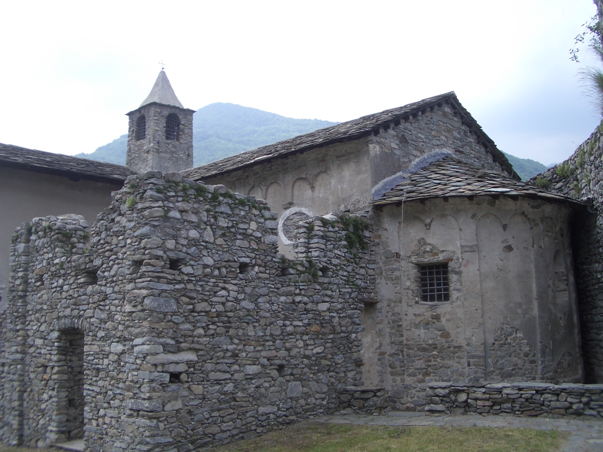 “Chiesa di Santa Croce”, Sparone, Turin, Italy